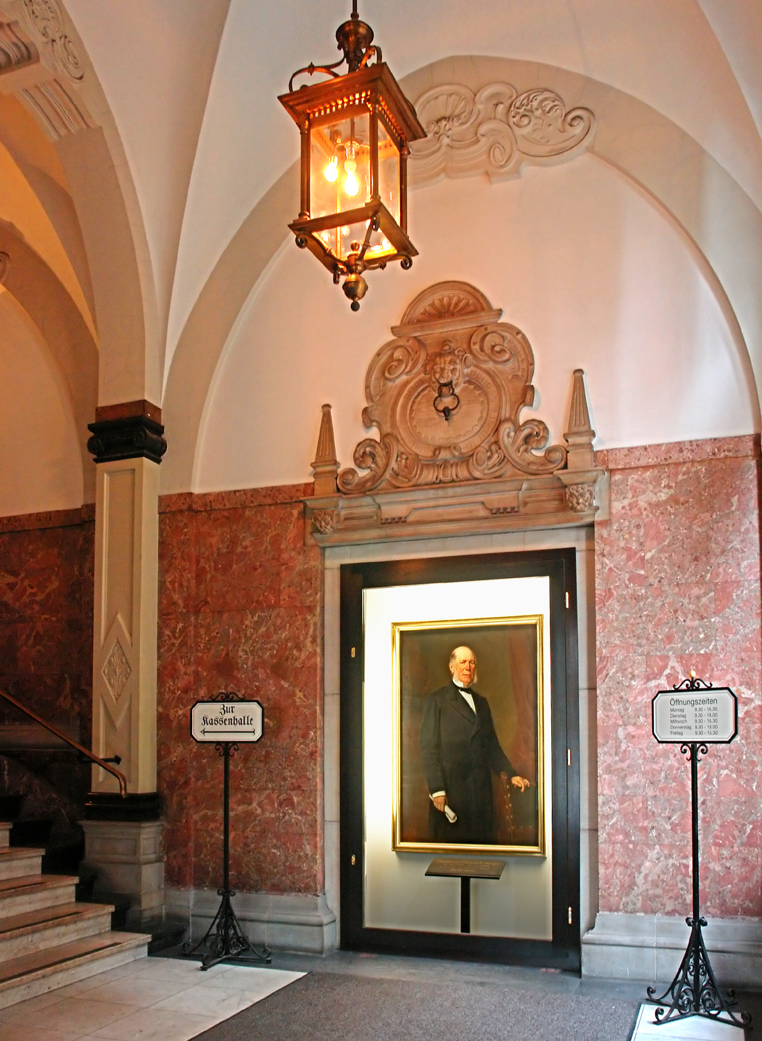 Bremer Bank (historischer Teil) Domshof 8. Eingang mit Portrait Hermann Henrich Meier (1809–1898), Gründer der Bremer Bank